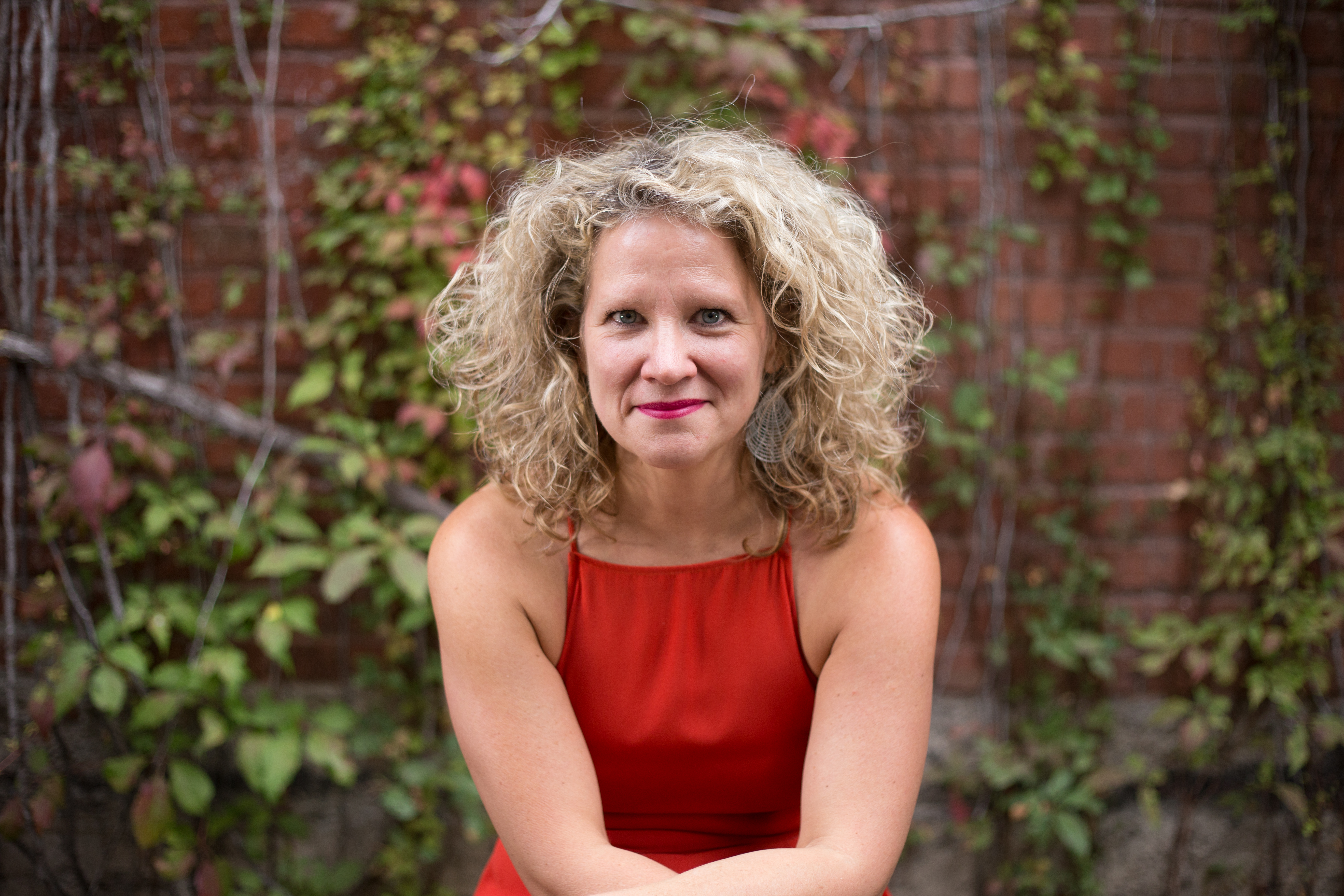 Portrait réalisé dans le cadre du 5 à 7 des Sommets du cinéma d’animation.